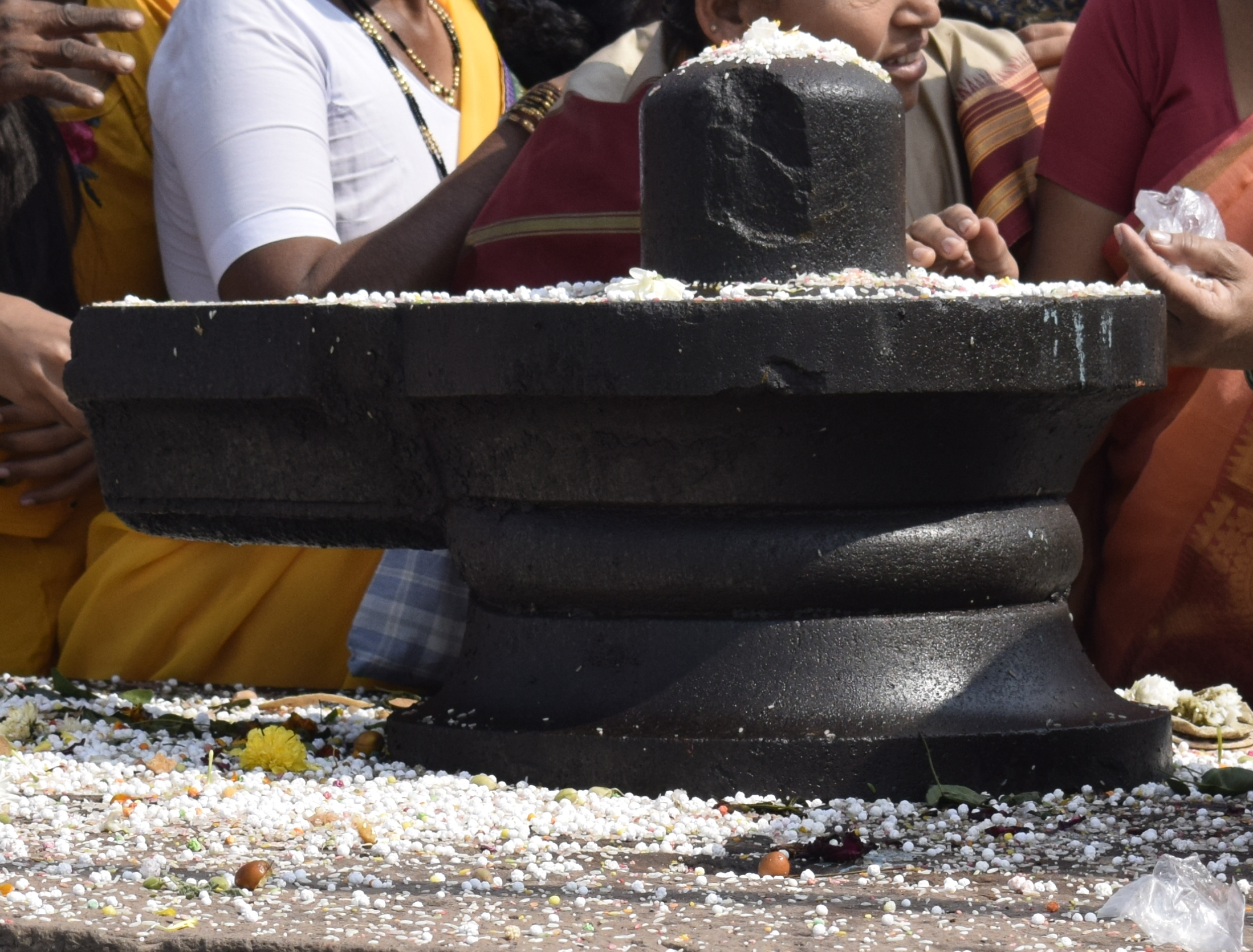 श्री ज्योतीश्वर लिंग